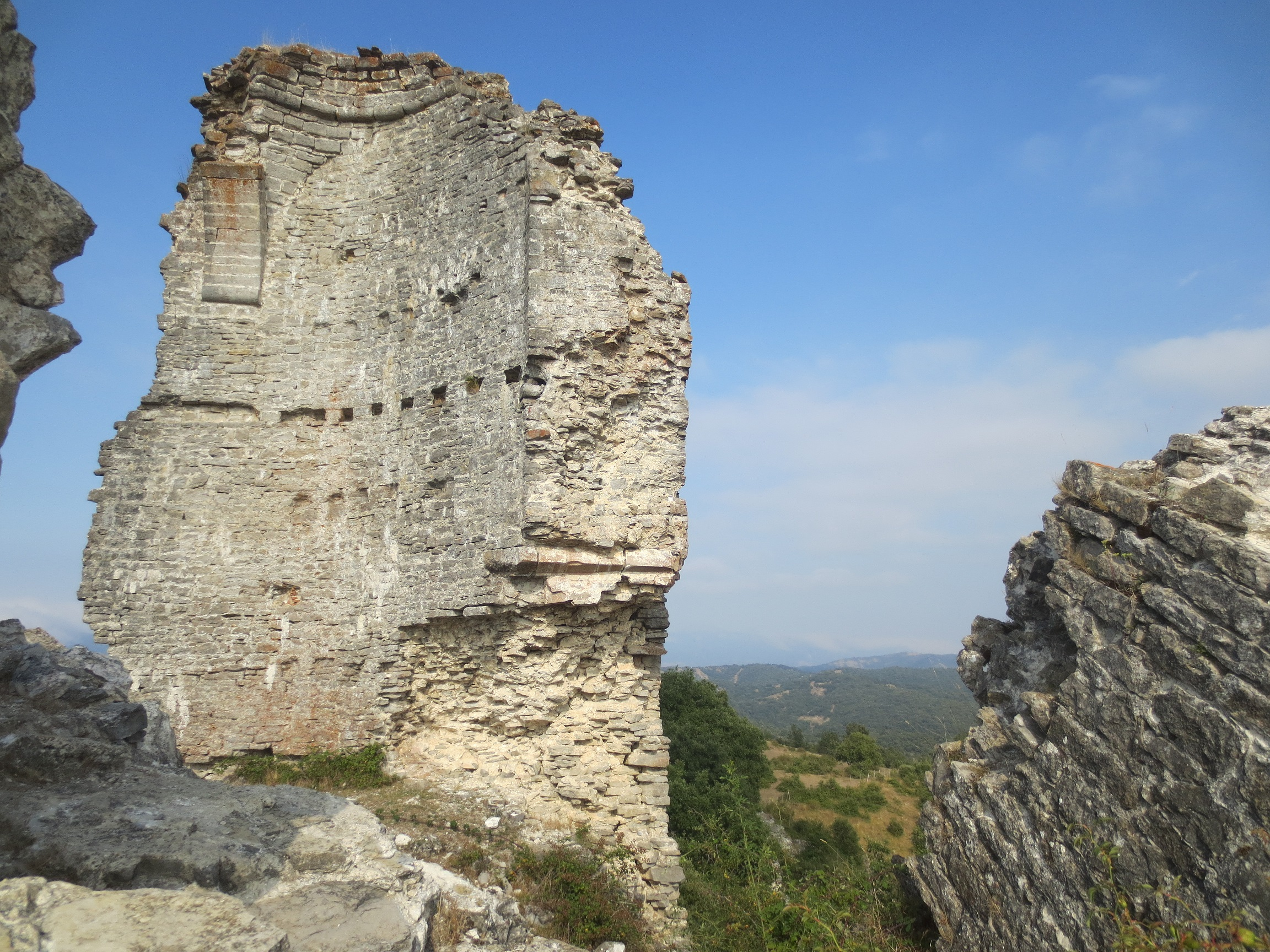 Gebara gaztelua